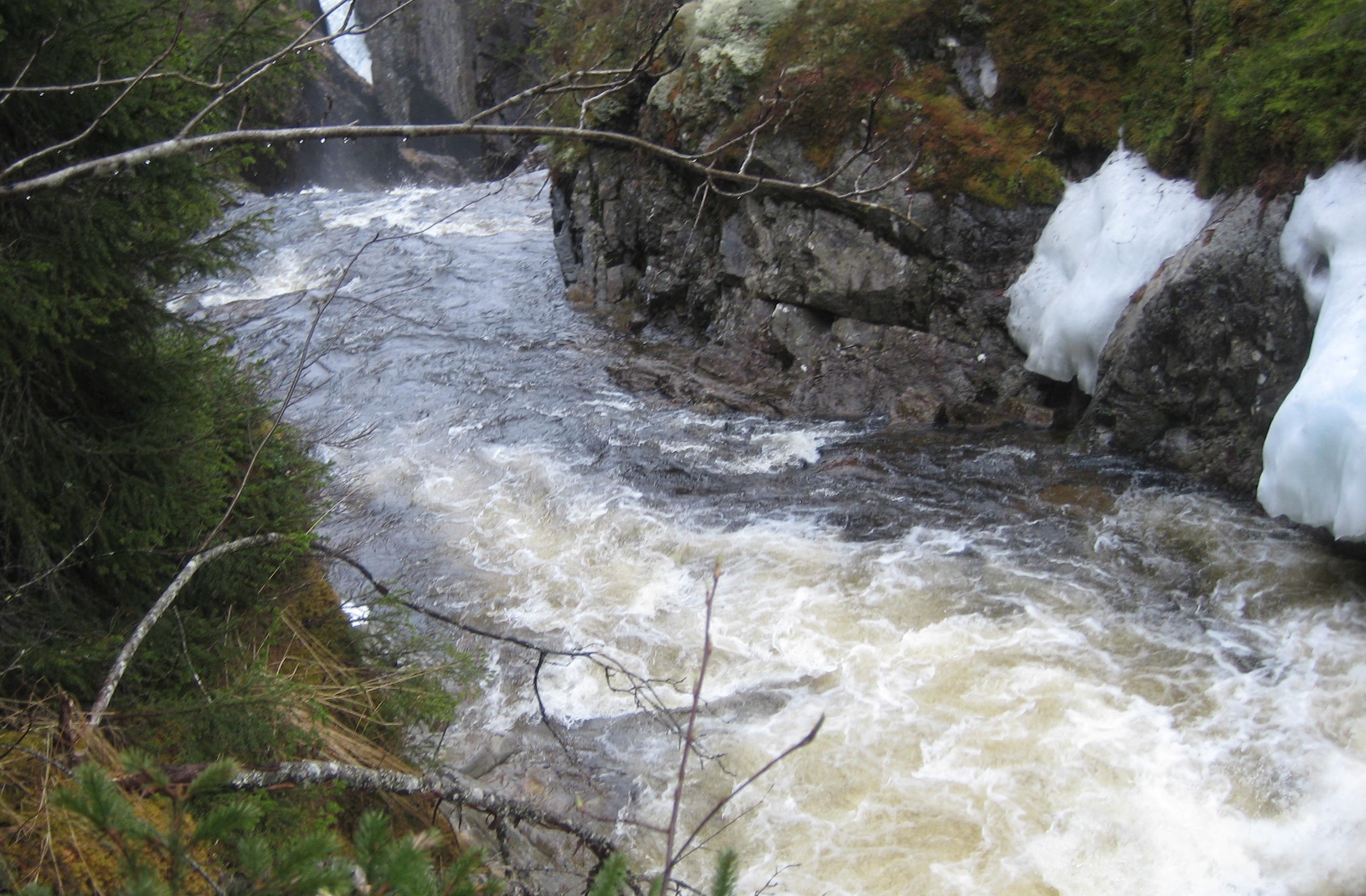 Kjøljua